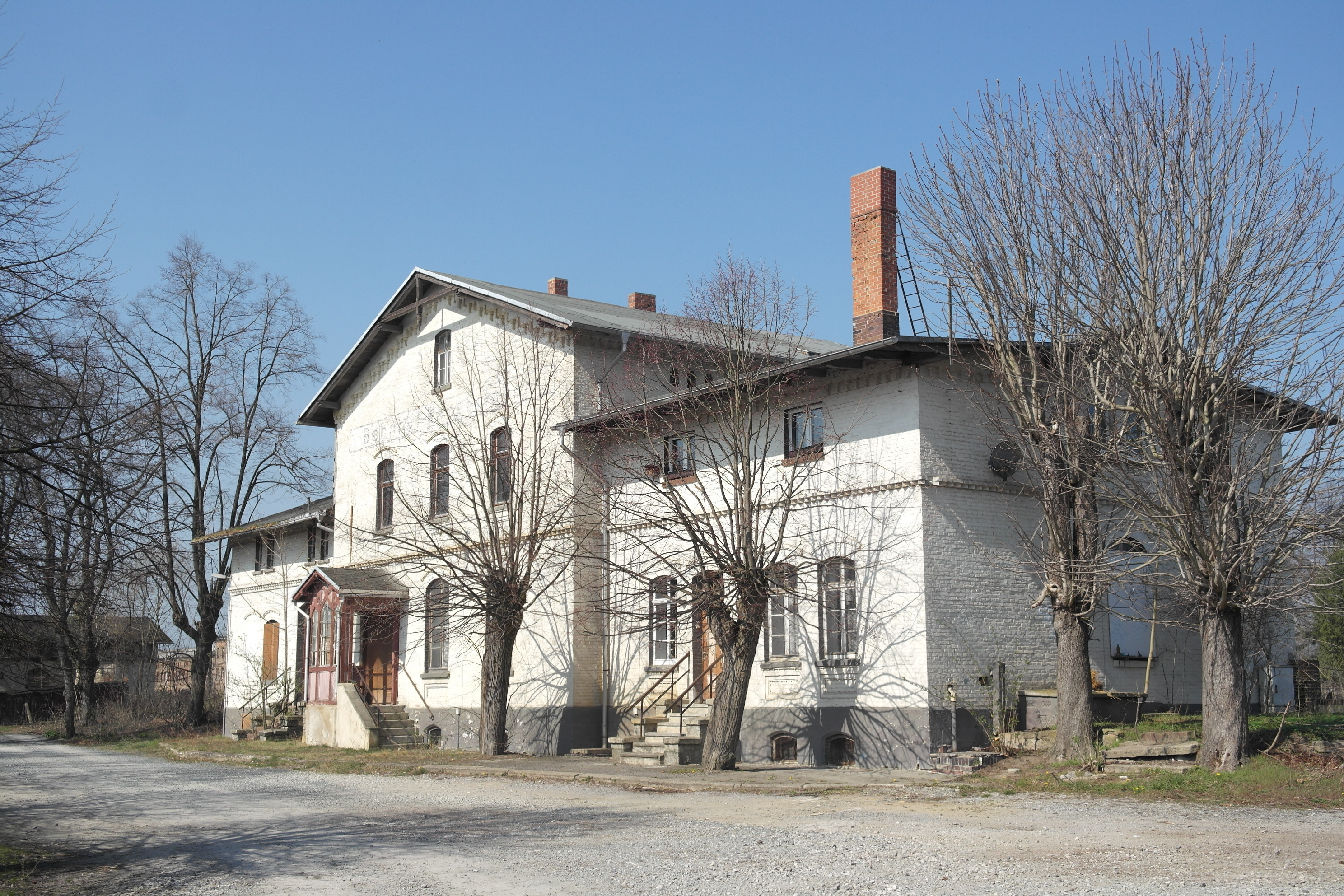 Bahnhof Wasserleben, Straßenseite